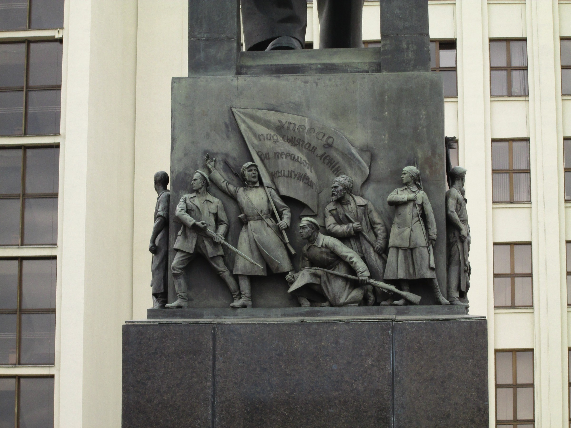 Maskoŭski Rajon, Minsk, Belarus